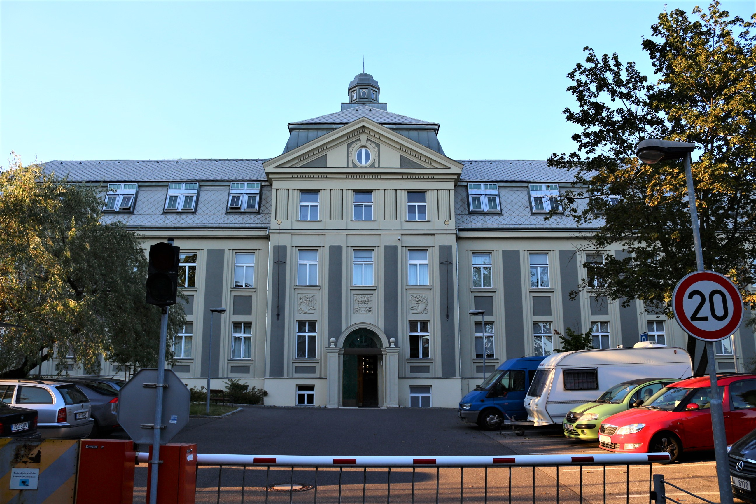 Domov sociální péče Pražské židovské obce - Hagibor